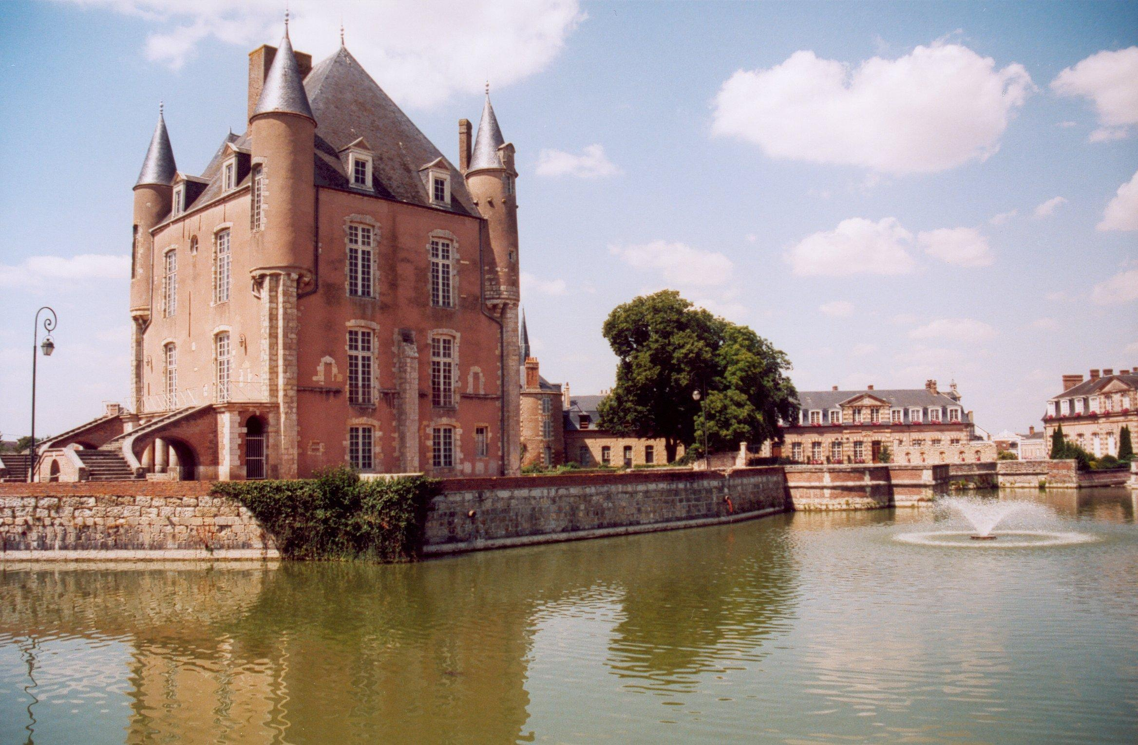 France Loiret Bellegarde Château Photographie prise par GIRAUD Patrick